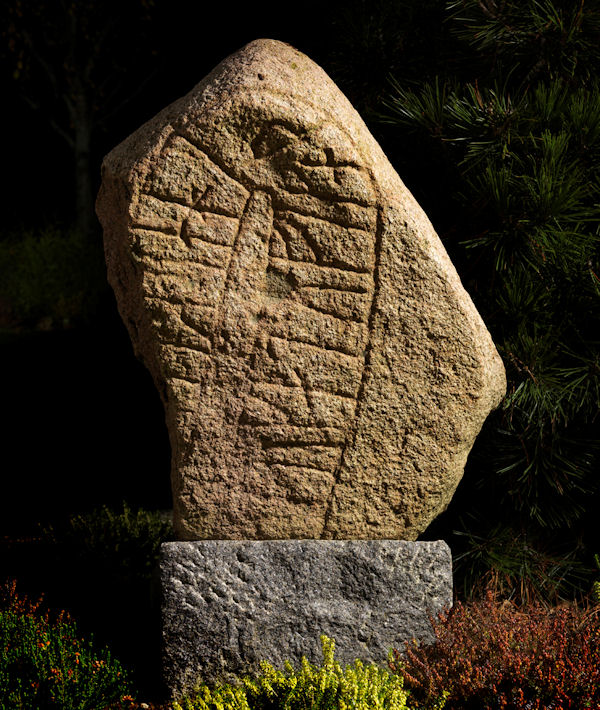 Foto af Roberto Fortuna